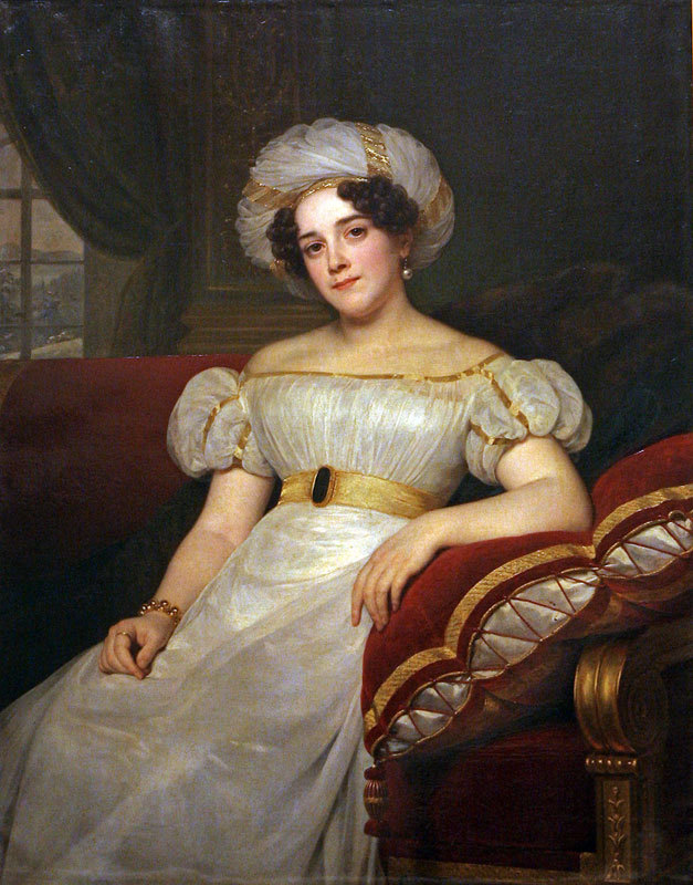 Голицына Наталья Степановна, урожд. графиня Апраксина (1796—1890)